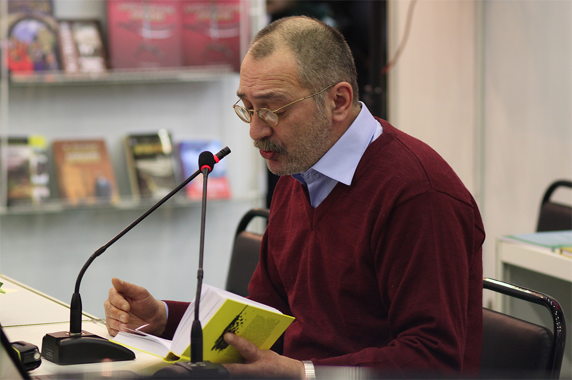 Russian poet Timur Kibirov